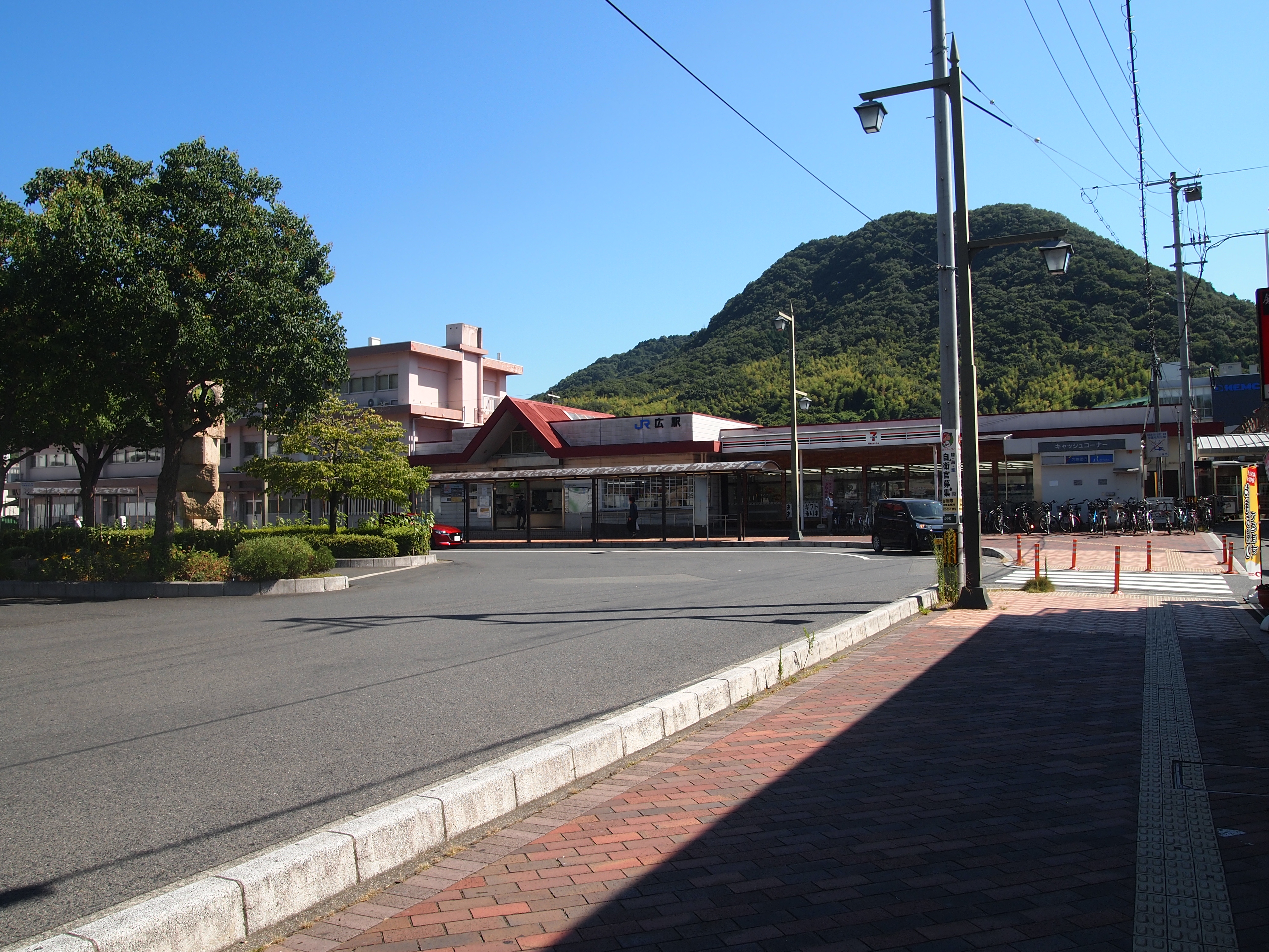 広駅